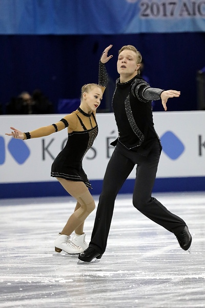 Анастасия Полуянова / Дмитрий Сопот (Россия) на финале юниорского Гран-при 2017-2018